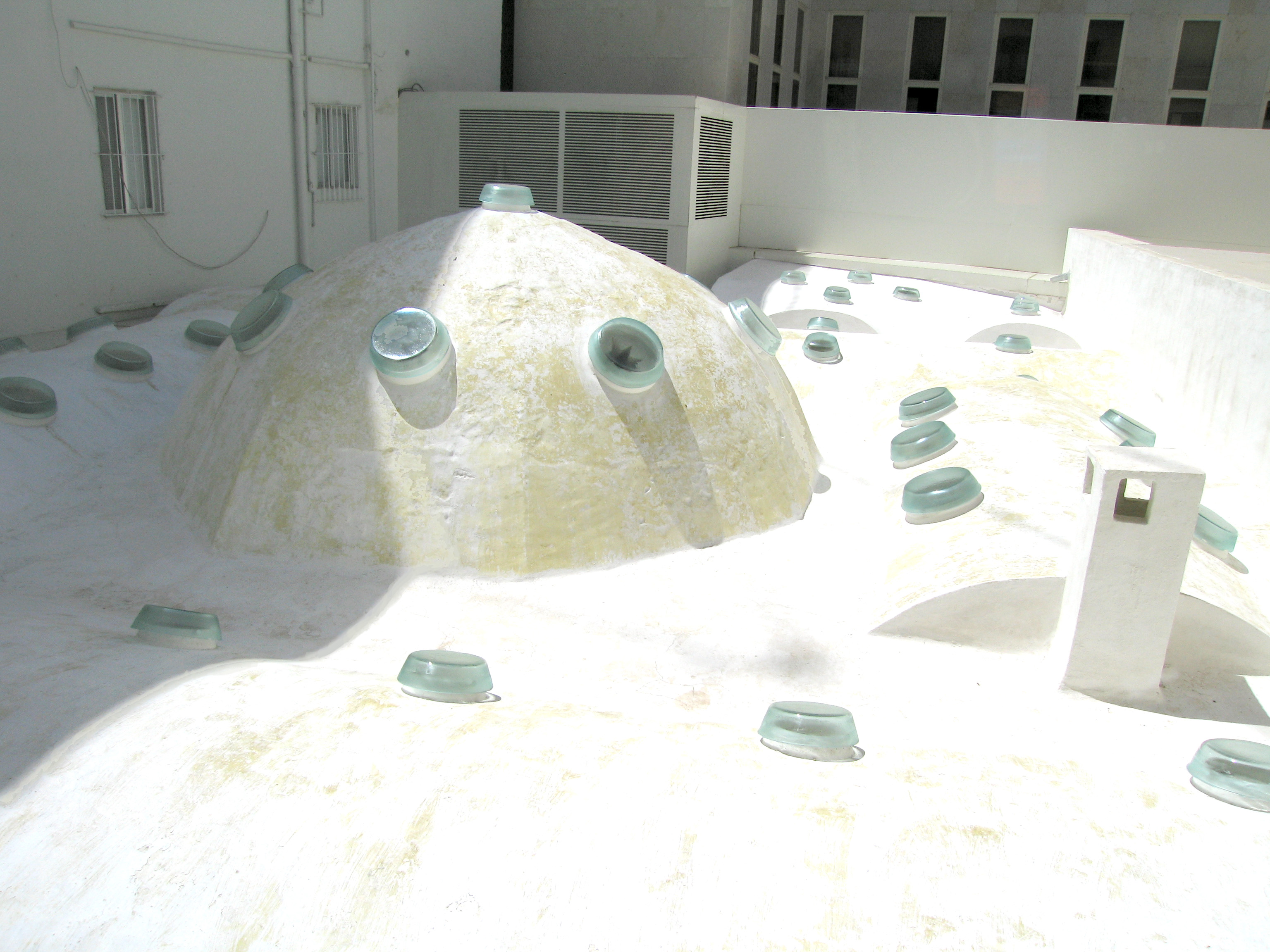 Banys de l'Almirall(València)